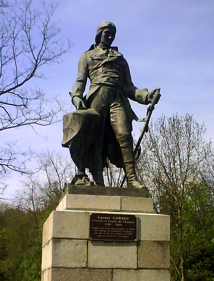 Statue de Lazare Carnot - Mont National - Obernai - Alsace